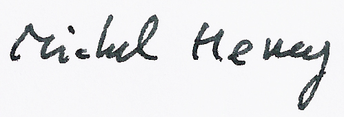 Signatur seines handschriftlichen Briefes an mich vom 19.2.1994